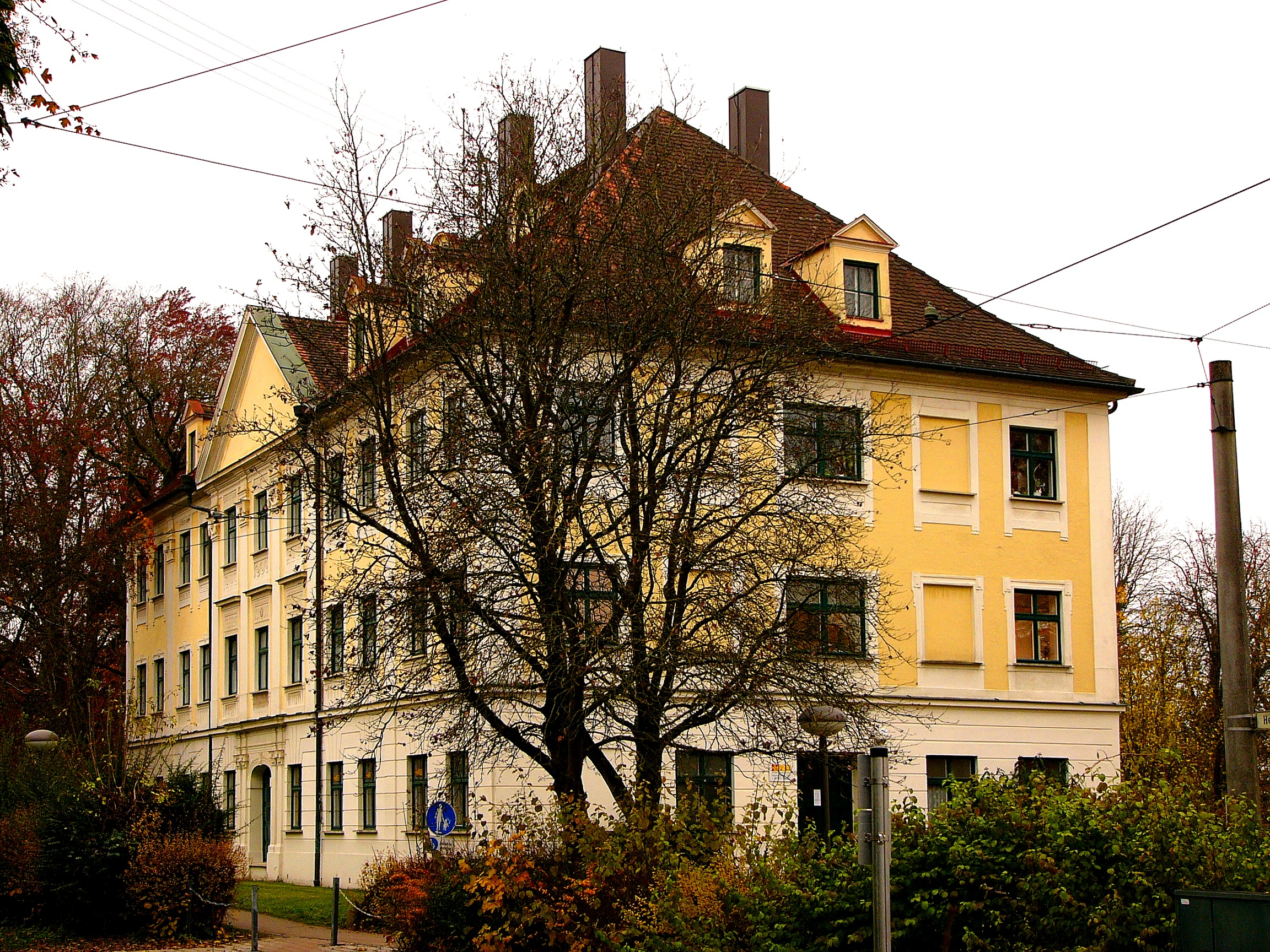 Hessingsche Orthopädische Heilanstalt; Ehem. Priesteraltersheim (Nr. 2), dreigeschossiger Walmdachbau mit übergiebeltem Mittelrisalit und klassizistischen Wandgliederungen, durch Fürstbischof Clemens Wenzeslaus errichtet, 1790;This is a photograph of an architectural monument.